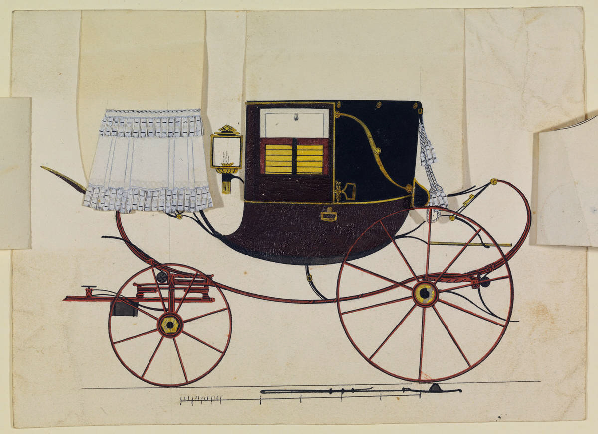 Entwurf einer Landaulette (Halblandauer) mit aufklappbaren Teilen zur Simulation verschiedener Ausstattungen. Aquarellierte Tuschefederzeichnung von Konrad Krug, Bamberg 1822 (Staatsbibliothek Bamberg, VIII J 4/2).